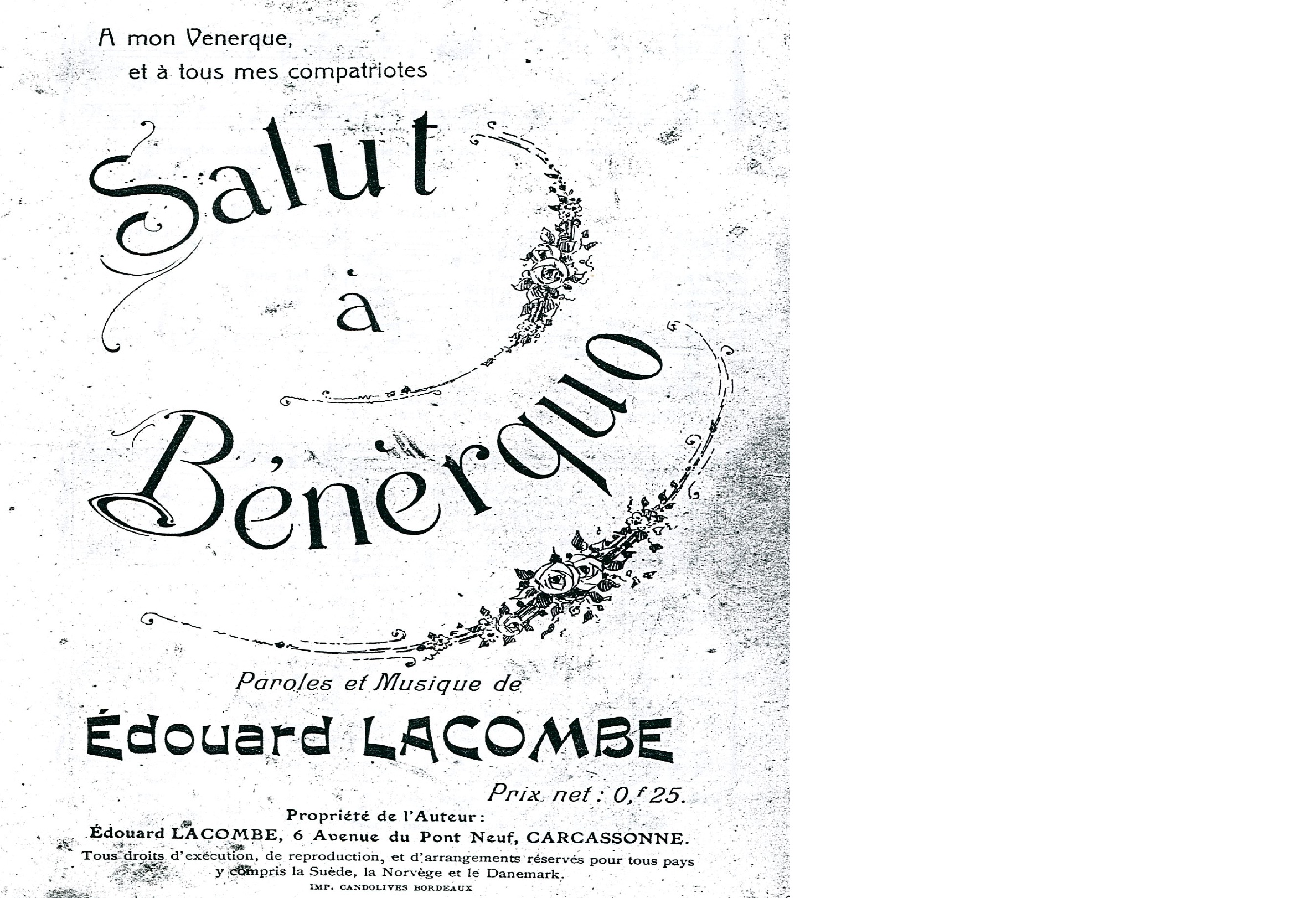 photocopie partition